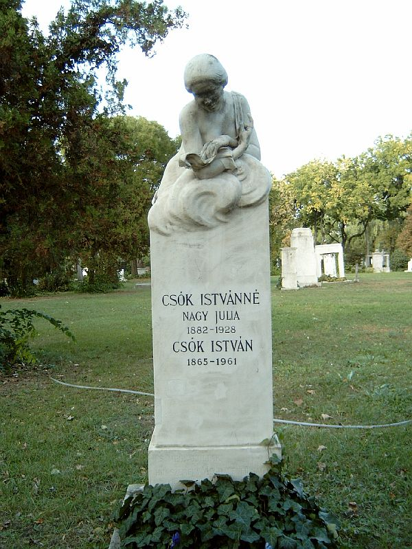 Csók István és felesége sírja. Kerepesi temető: 35-1-74, Budapest (2016), Szentgyörgyi István, Káldi Richárd (restaurátor) (közr.)